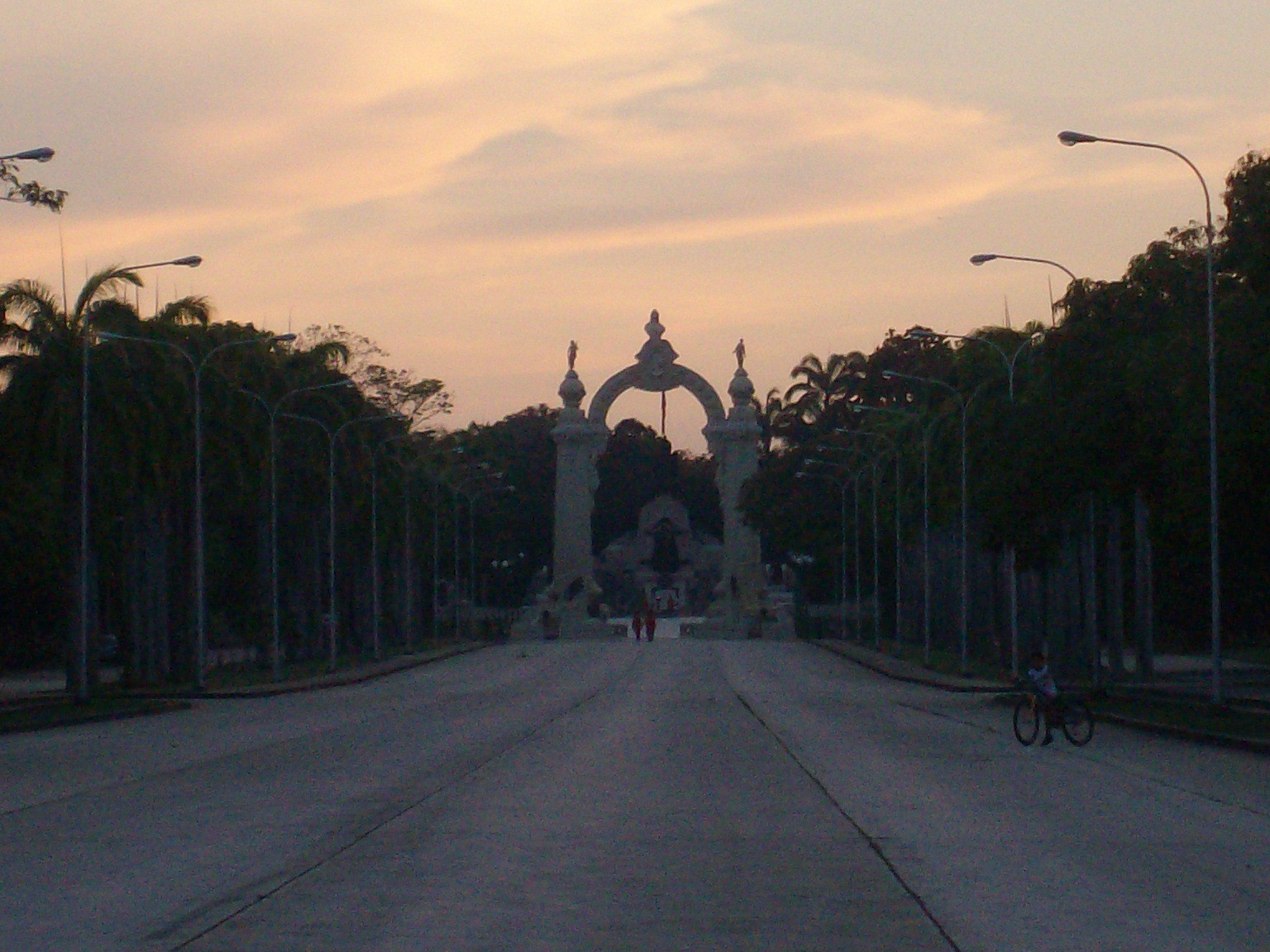 Arco de Carabobo, Valencia (Venezuela)